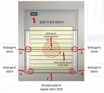 שאטרוול